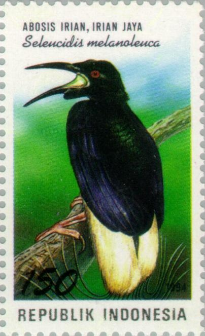 Seleucidis melanoleucus